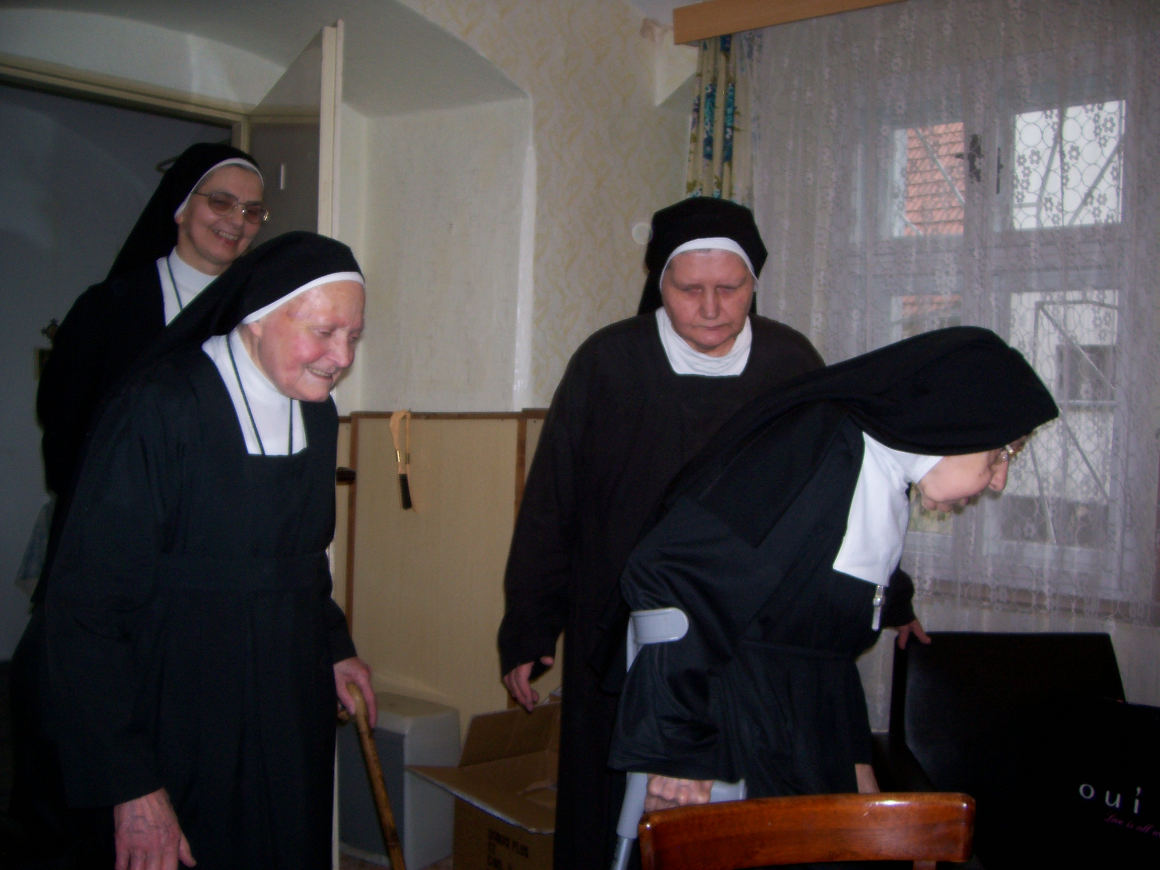 15. května 2007 Komunita čtyř sester vizitantek v klášteře na Chlumci Ústí nad Labem před stěhováním